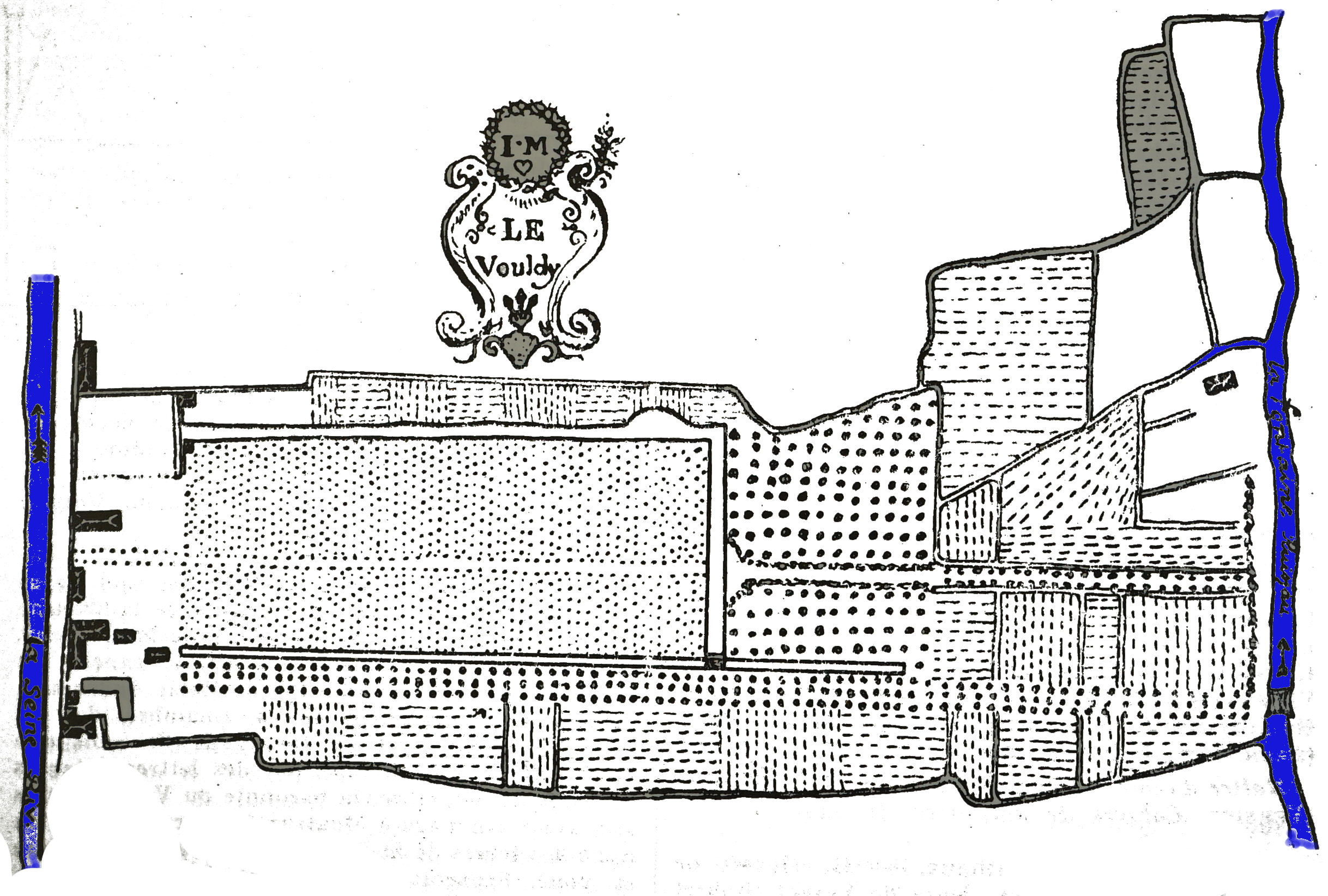 Ancien domaine du Vouldy de Troyes, issu de la collection des archives de l'Aube.